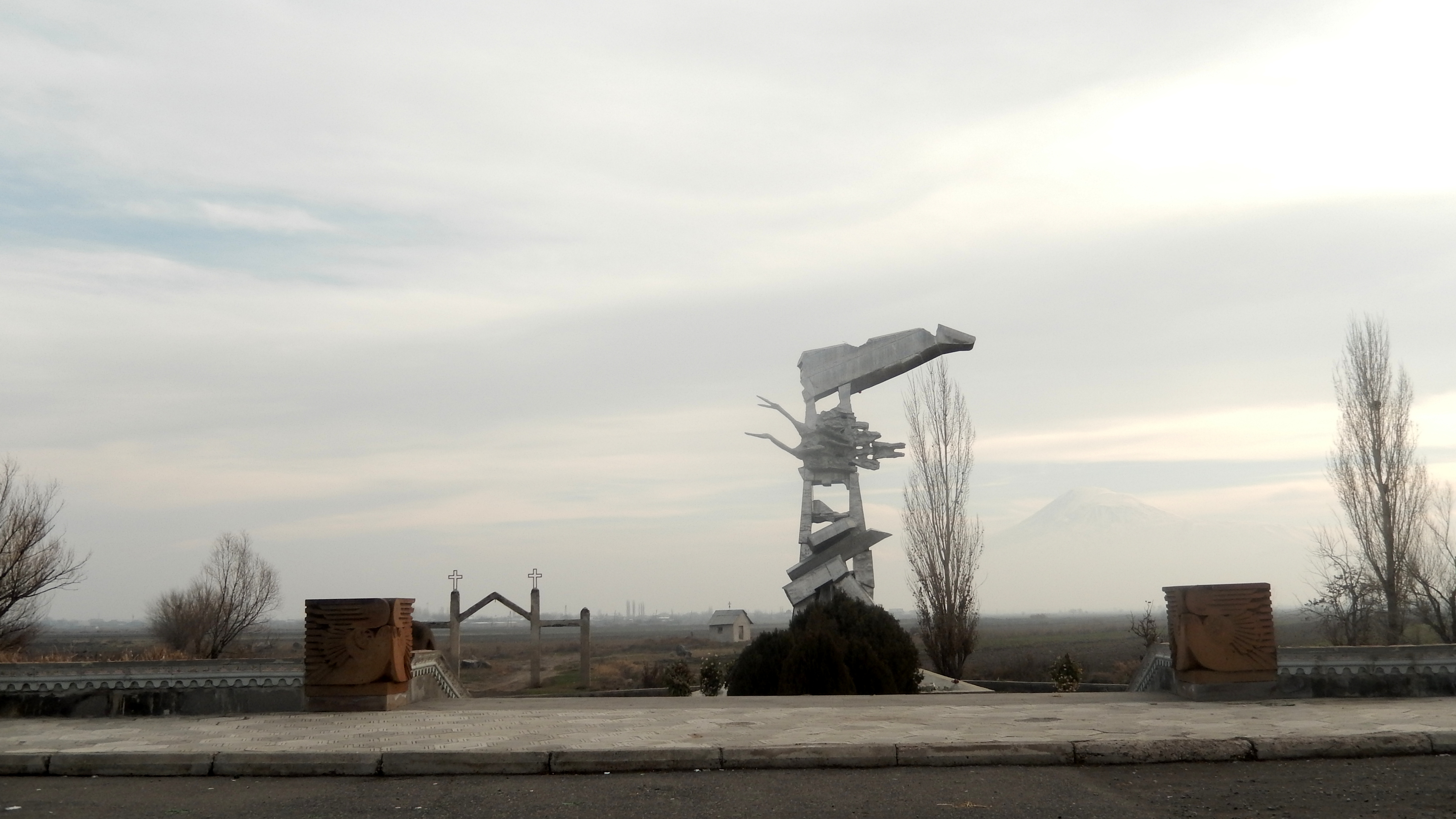 1988 թվականին ավիավթարի զոհ հարավսլավացի օդաչուների հուշարձան, ճարտարապետ՝ Կառլեն Անանյան 21/2